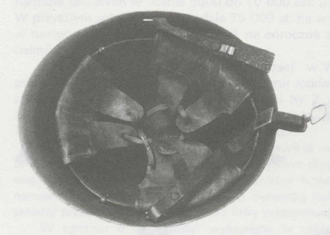 Hełm polski wz. 31 - fasunek